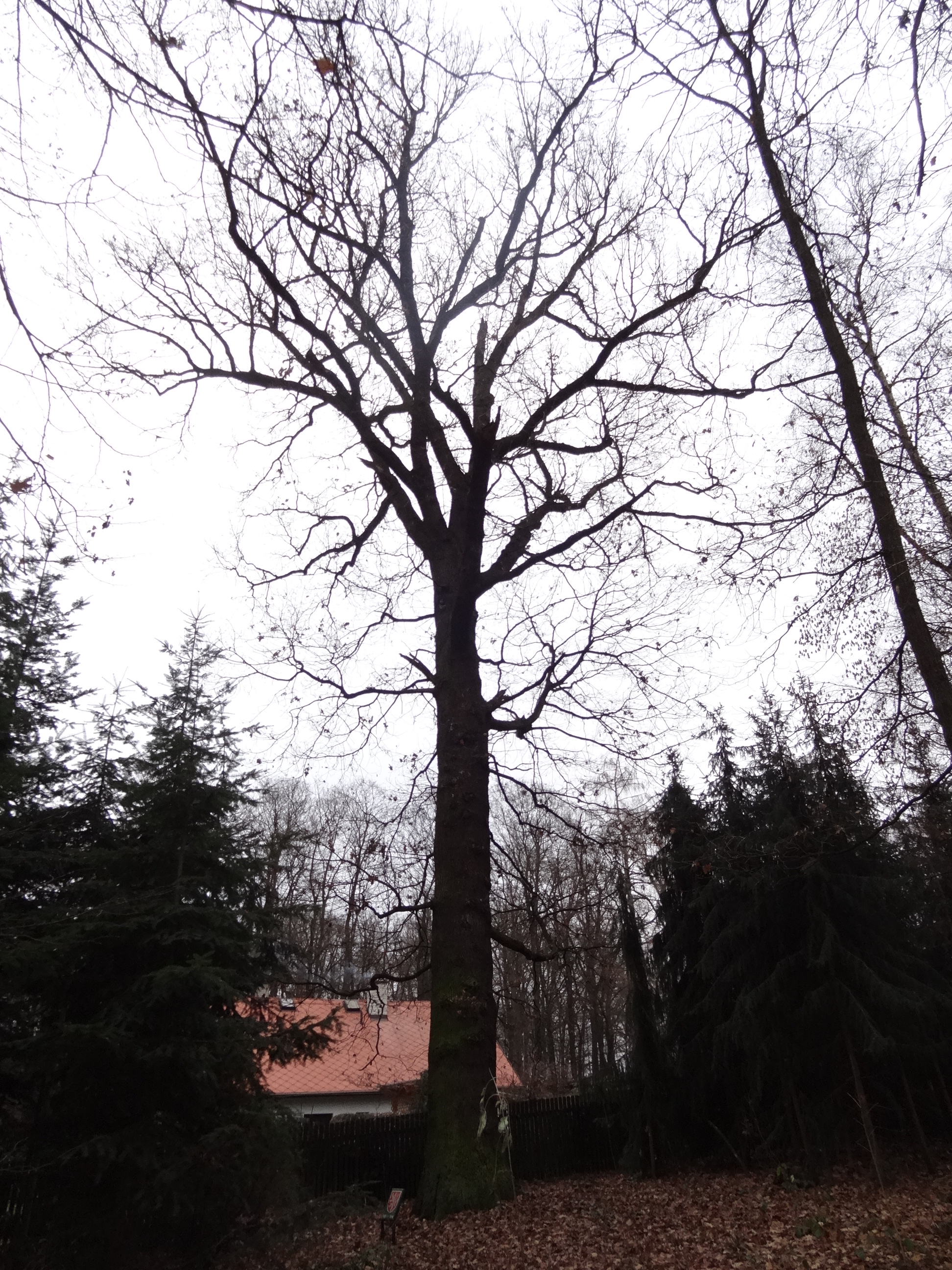 Bohnice - památný dub letní západně od hájovny v Čimickém háji